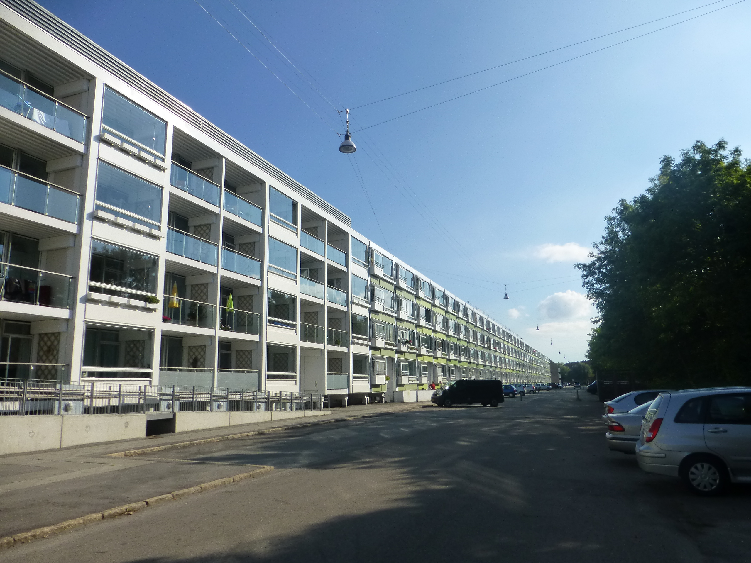 The street Rymarksvej in Hellerup in Copenhagen.